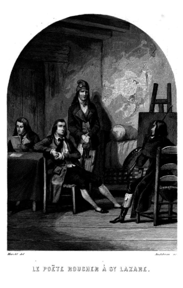 Jean-Antoine Roucher poeta del siglo XVIII